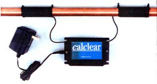 Descalcificador electrónico instalado en una tubería de cobre. Descalcificador de uso doméstico instalado en tubería de cobre.